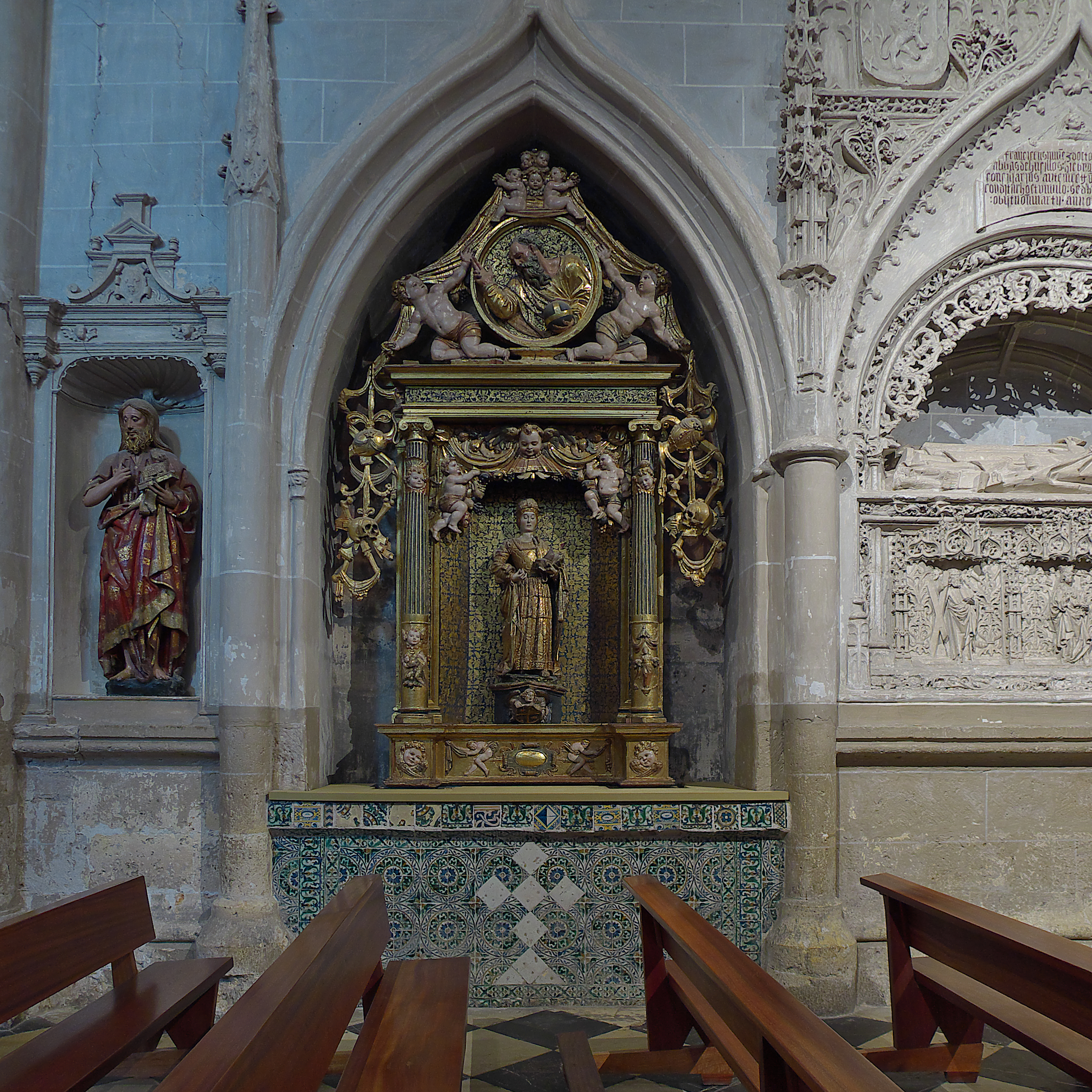 Muro septentrional de la Capilla Mayor catedralicia. Manuel Álvarez, escultor con taller en Palencia, realiza el retablo (1556) para imagen tardogótica de Santa Apolonia.